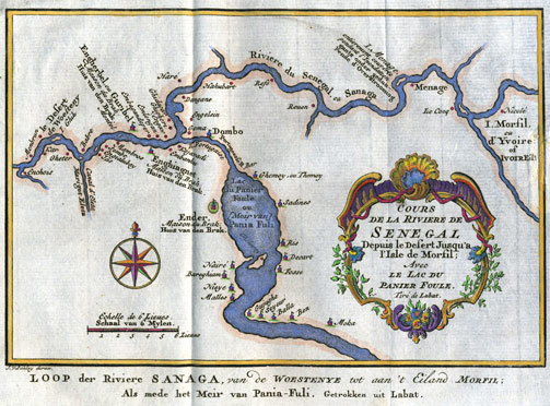 Vallée du Sénégal, jusqu'à l'île à Morfil avec le Lac de Guiers (carte du XVIIe siècle). cliquez pour agrandir